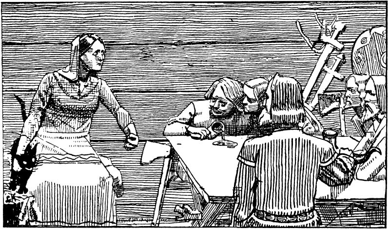 Christian Krogh: Illustration for Eiriksønnenes saga, Heimskringla 1899-edition. nn: «Gunnhild eggjar sønene sine.» nb: «Gunnhild egger sønnene sine.»